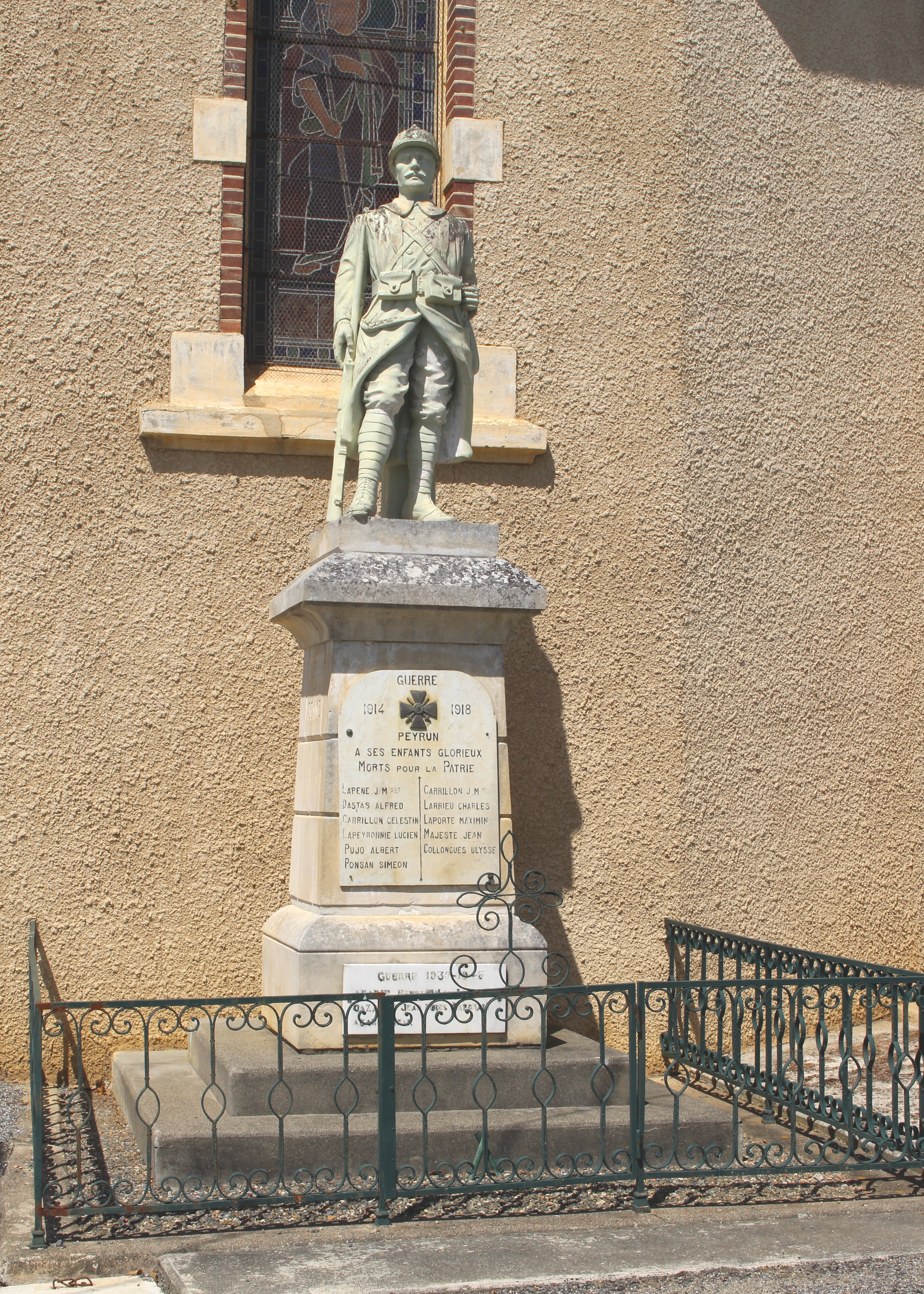 Monument aux morts de Peyrun (Hautes-Pyrénées)